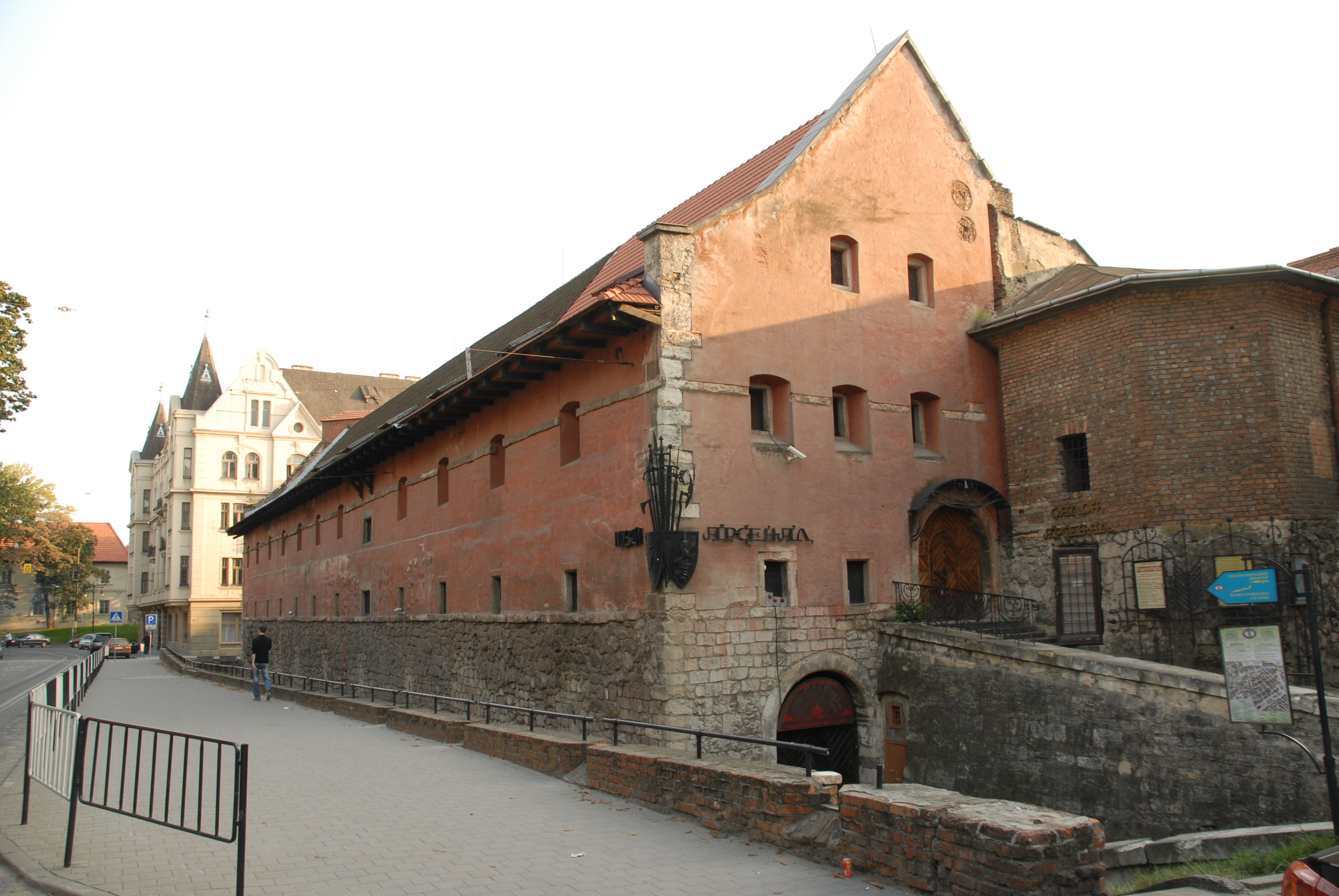 Міський арсенал, Львів, Підвальна, 5